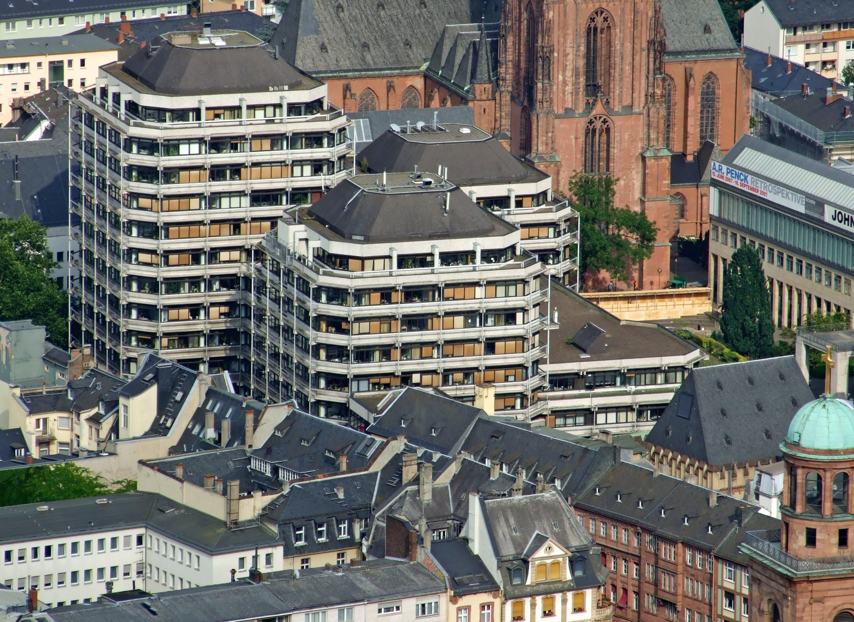 Technisches Rathaus, neben Dom in Ffm